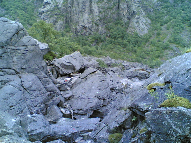 Steinur i Fidjadalen, Mån i Gjesdal